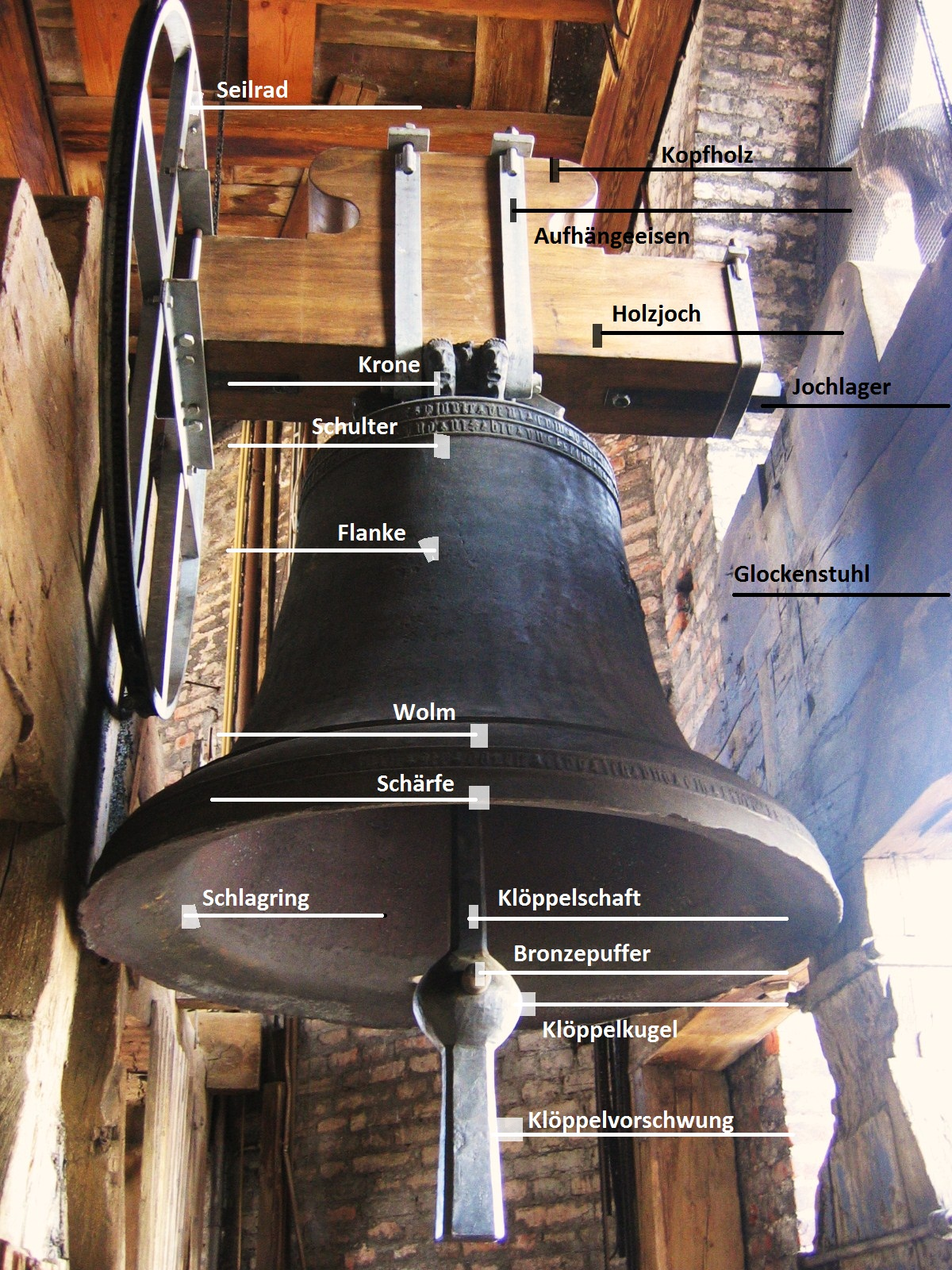 Benennung der einzelnen Glockenteile